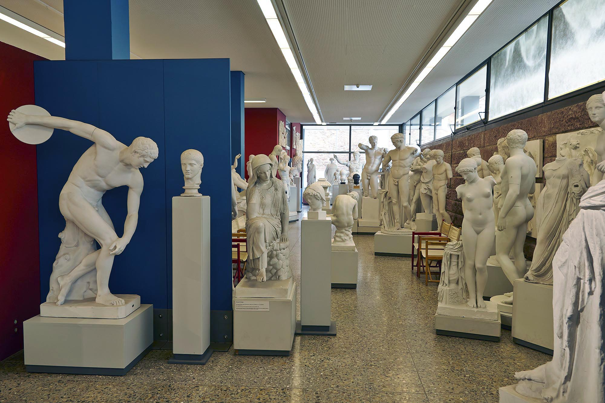 Antikenmuseum der Universität Heidelberg – Abguss-Sammlung, Ostsaal. Fotograf: Hubert Vögele